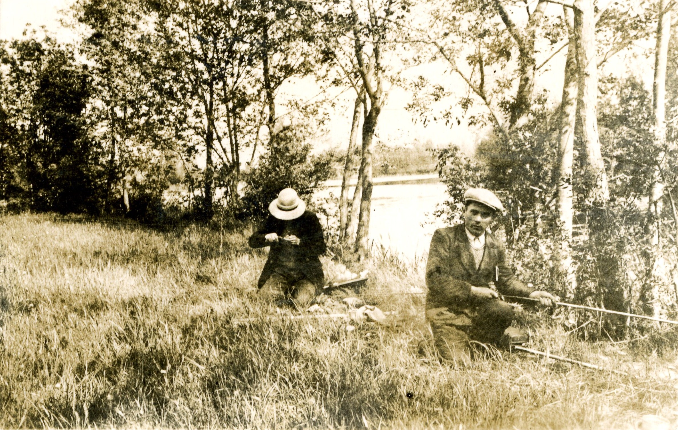 Une partie de pêche à la ligne au bord de l' étang de La Sablière (près de l' Île-d' Elle) le dimanche 9 mai 1937. Etang de La Sablière, L'Île-d' Elle (commune de), Vendée, France.